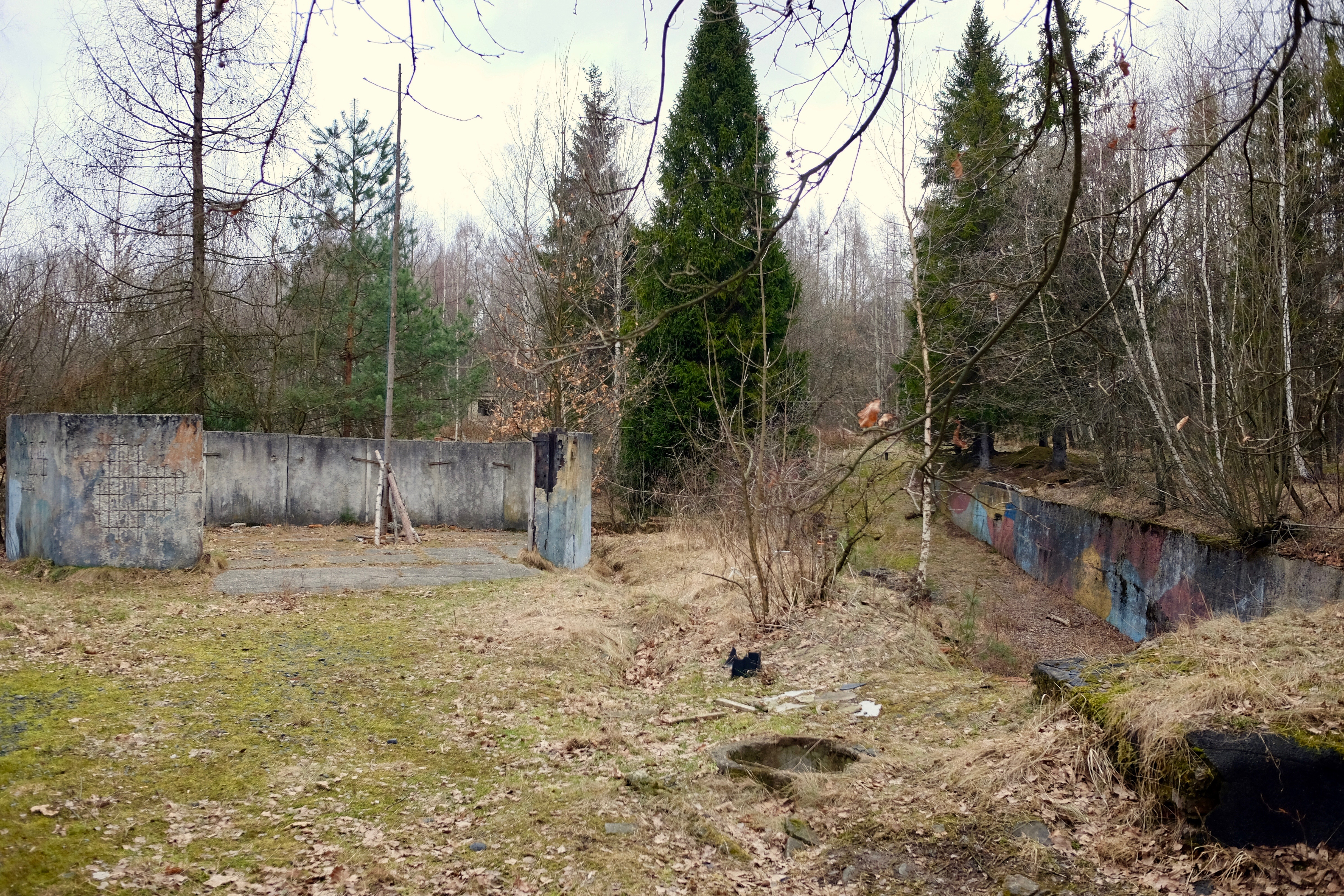 Vojenský areál ve Frýdeckém lese v Panských Nových Dvorech sloužil jako palebné postavení zapojené po protiletecké a raketové obrany Ostravy. Sídlil zde protiletecký raketový oddíl. Na snímku je palebné stanoviště (vlevo), za ním prosvítá stanoviště řídicích kabin a dále budova pro odpočinek směny.